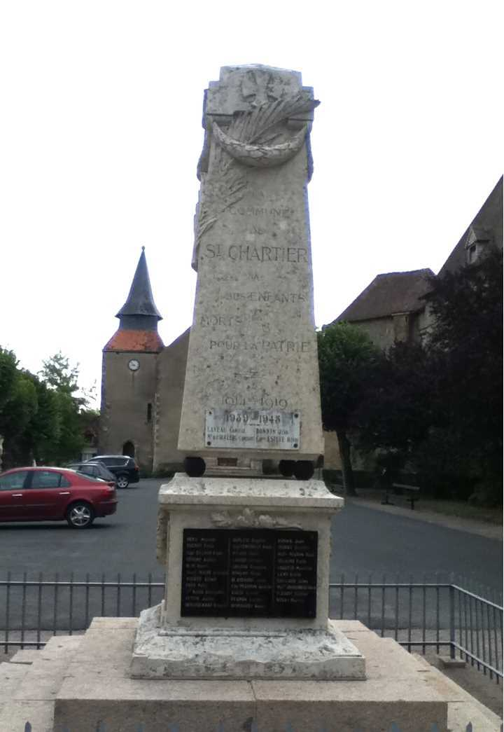 Monument aux Heroes de Saint Chartier